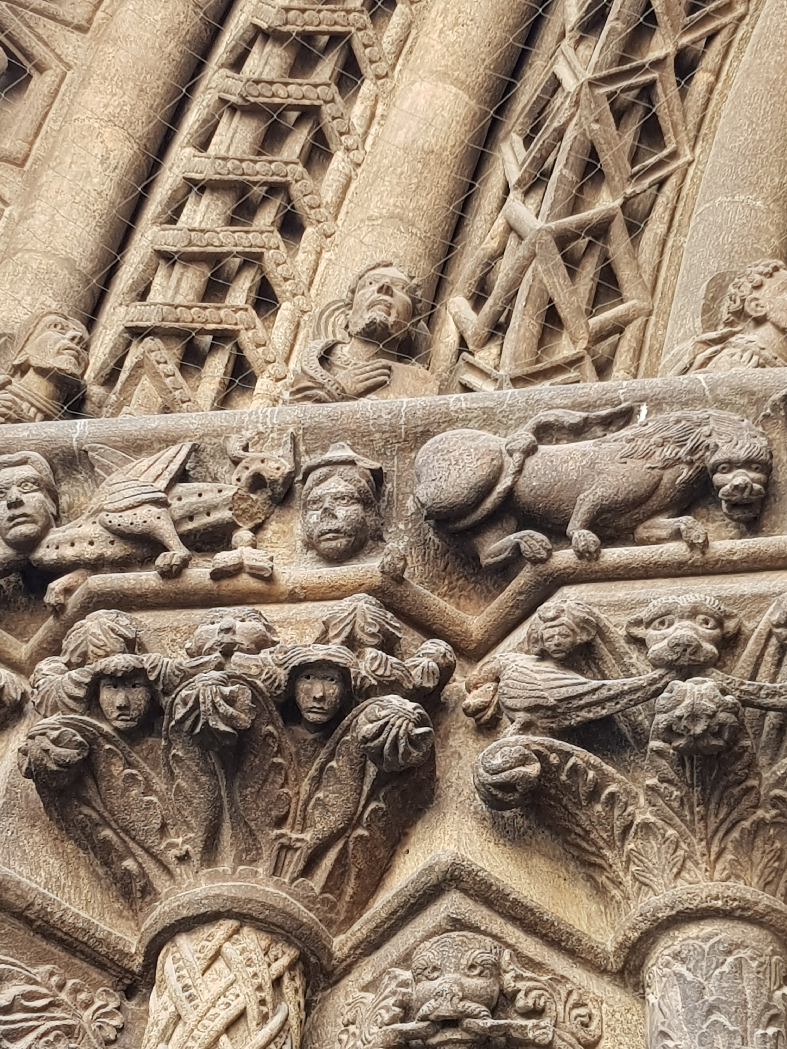 Zwischen Drachen und Löwen befindet sich der Kopf des Juden mit Judenhut